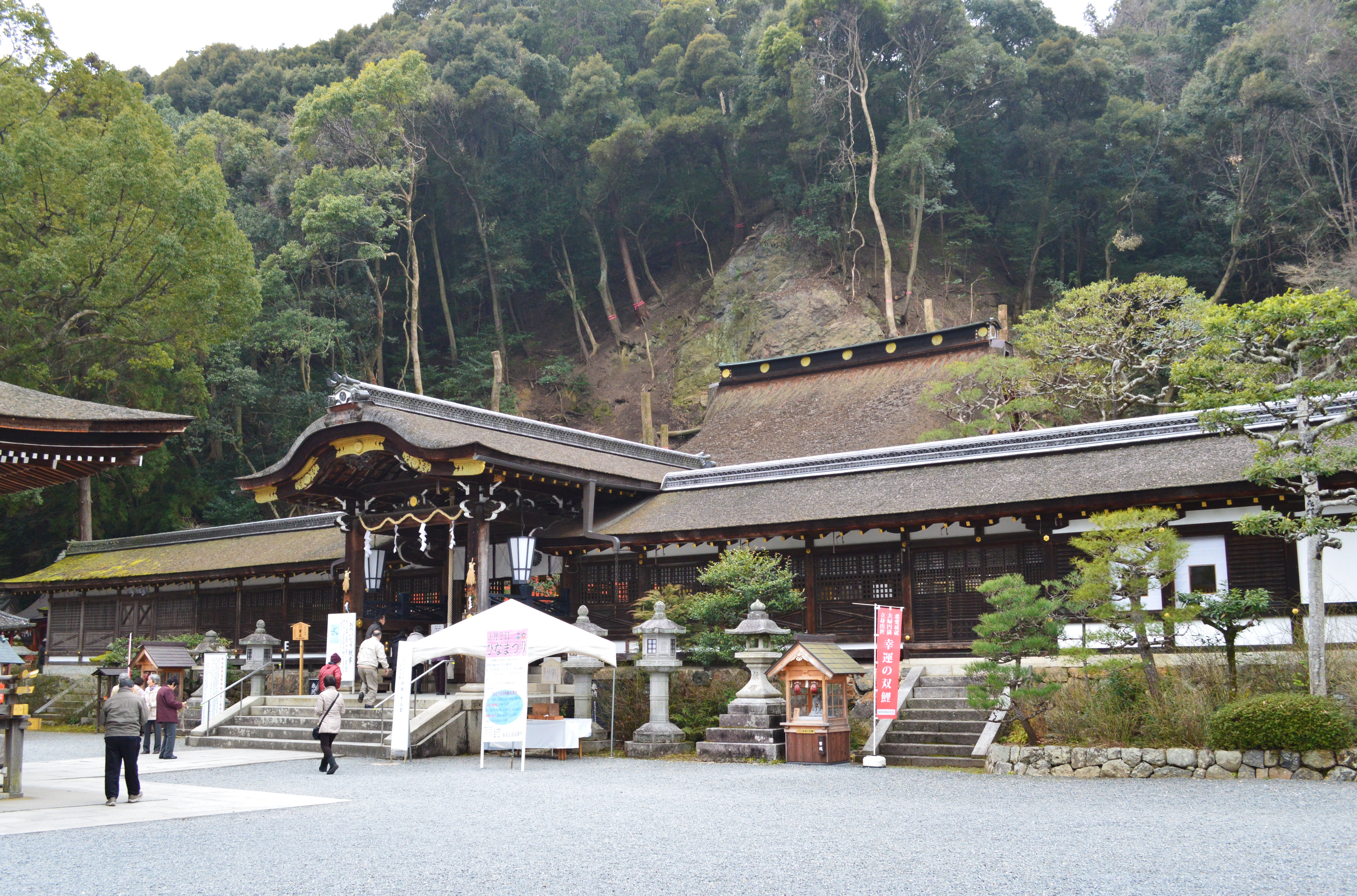 松尾大社 本殿遠景